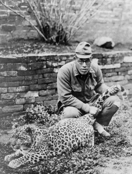 ハチと成岡正久小隊長